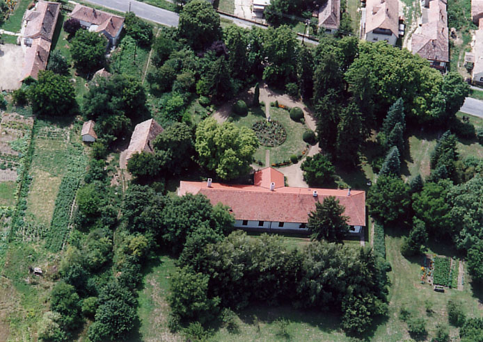 Nikla - Hungary - Europe